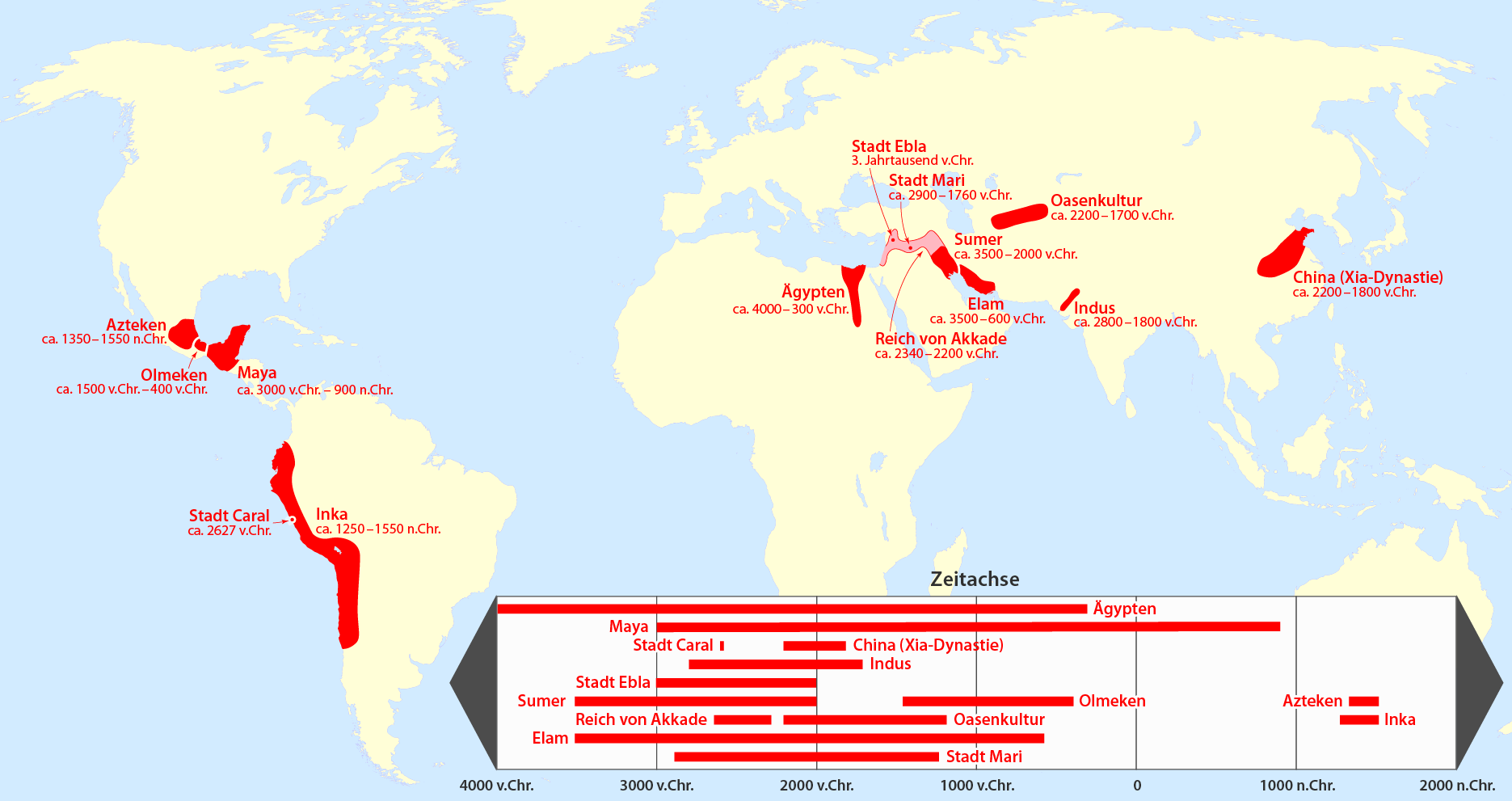 Karte der geschichtswissenschaftliche Hochkulturen